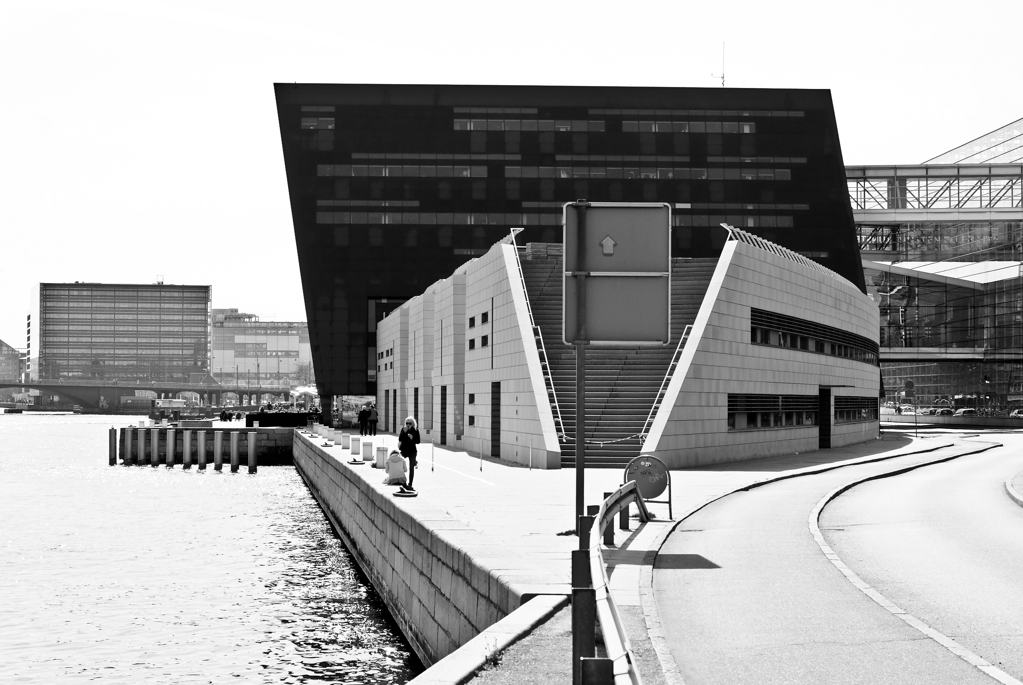 Det Kongelige Bibliotek (The Royal Library), Copenhagen